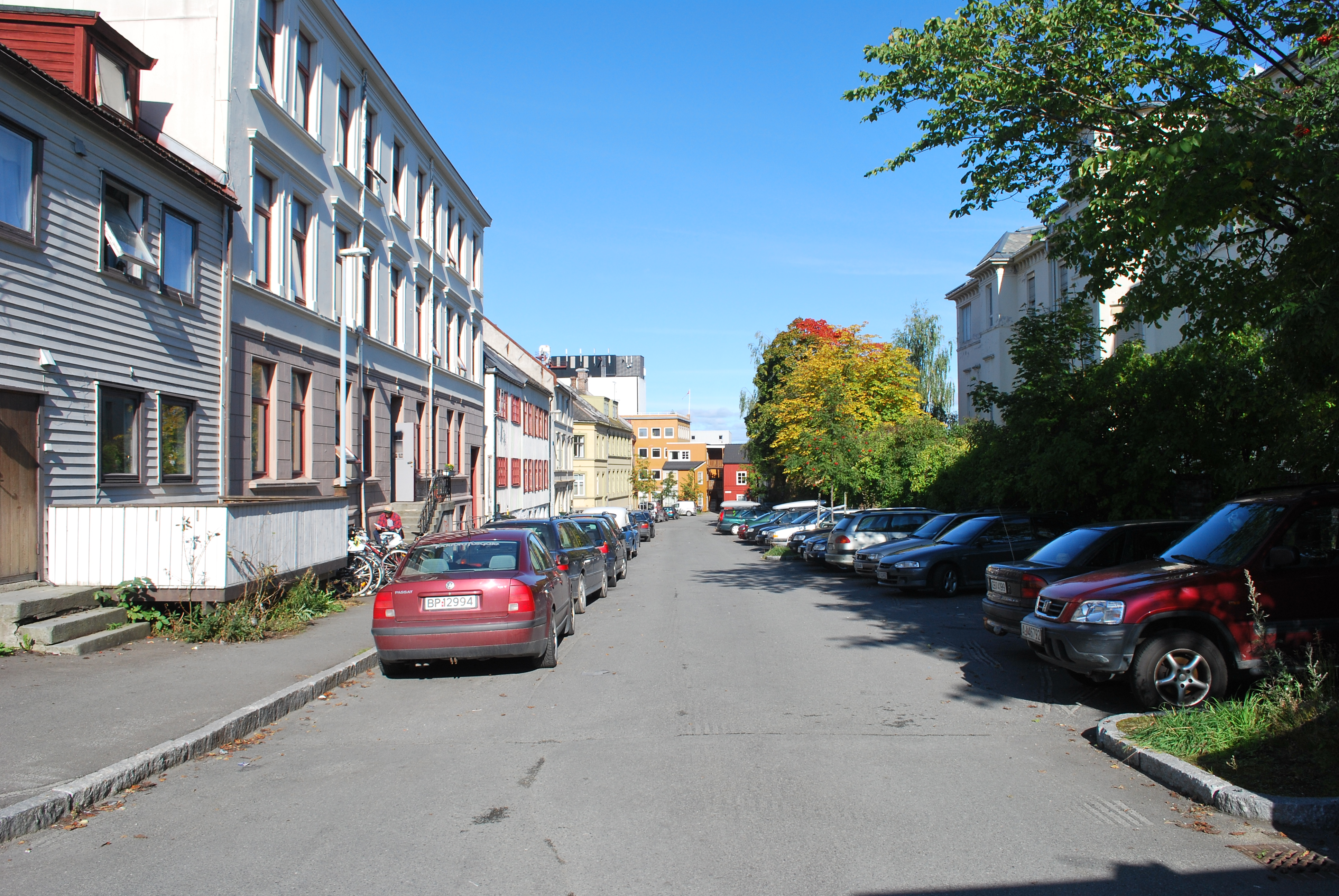 Hans Nissens gate ved Ila i Trondheim.